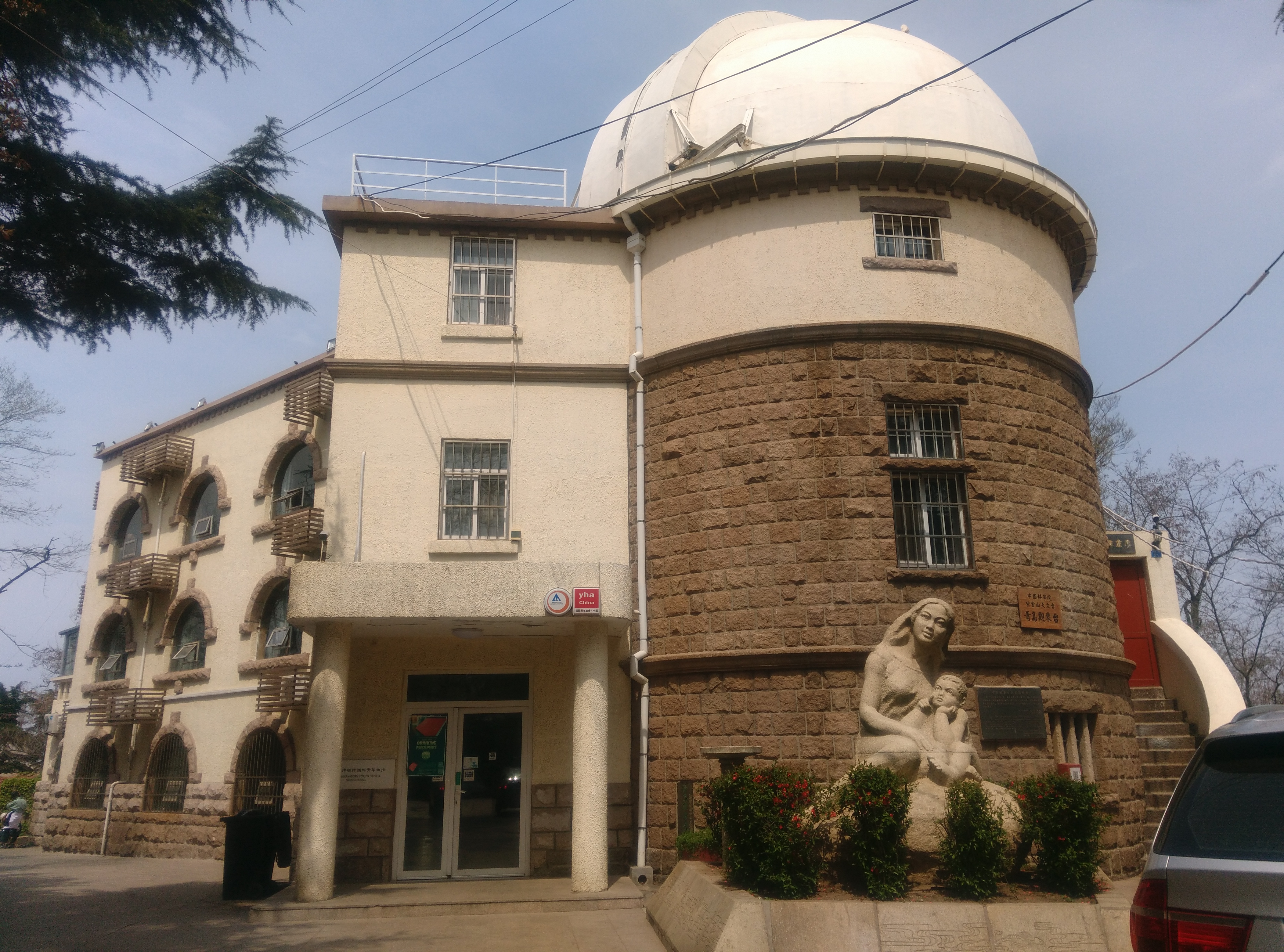 青岛观象台天文圆顶室